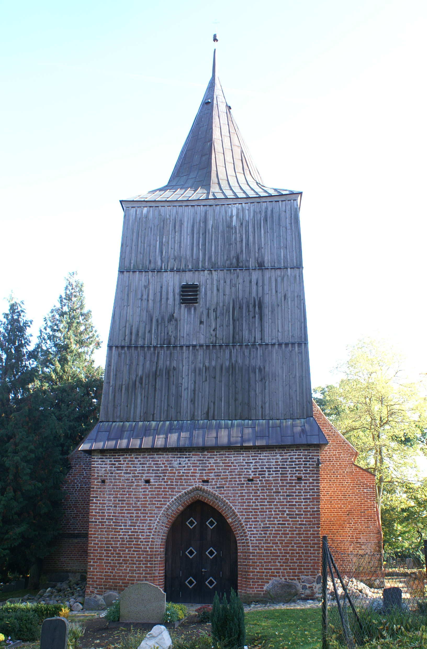 Dorfkirche in Hohendorf - Turm - Landkreis Ostvorpommern